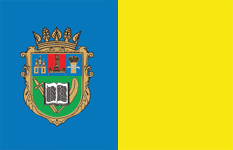 Прапор Корецького району